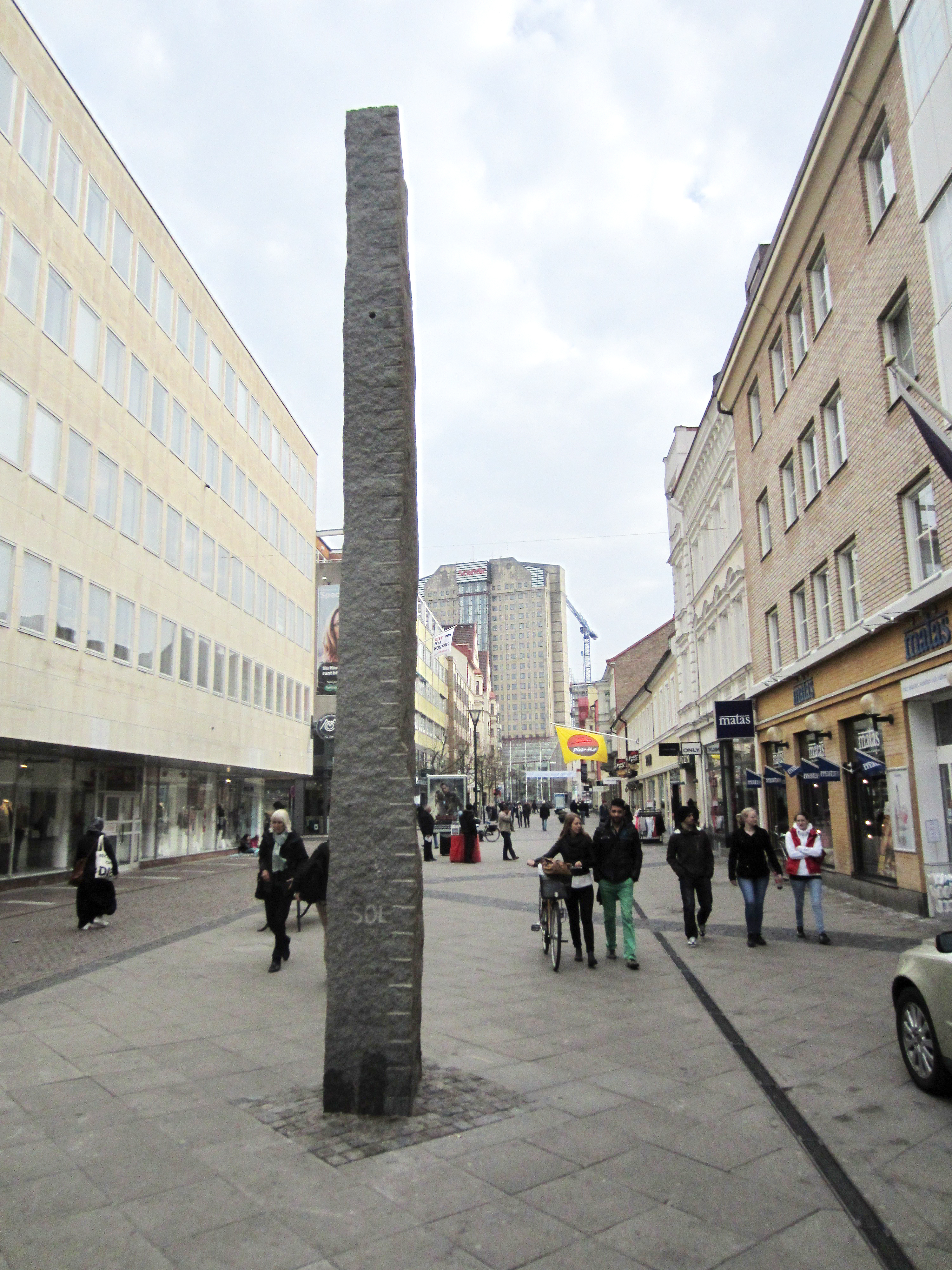 Statyn Solens finger på Södra Förstadsgatan i Malmö, Sverige.